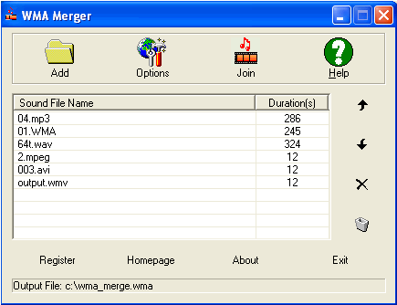 WMA połączeń można scalić wszystkie rodzaje plików dźwiękowych do plików WMA. Obsługuje wiele formatów audio, takich jak WMA, MP3, WAV, MPA, MP2, AU, AIF, SND, itp, oraz formaty wideo MPEG, AVI, VCD, WMV, ASF, DAT, MPE itp. Jeśli są zainstalowane dodatkowe kodeki, WMA połączeń może dołączyć DivX, OGG, AC3, mkv, OGM, MKA, SVCD itd.